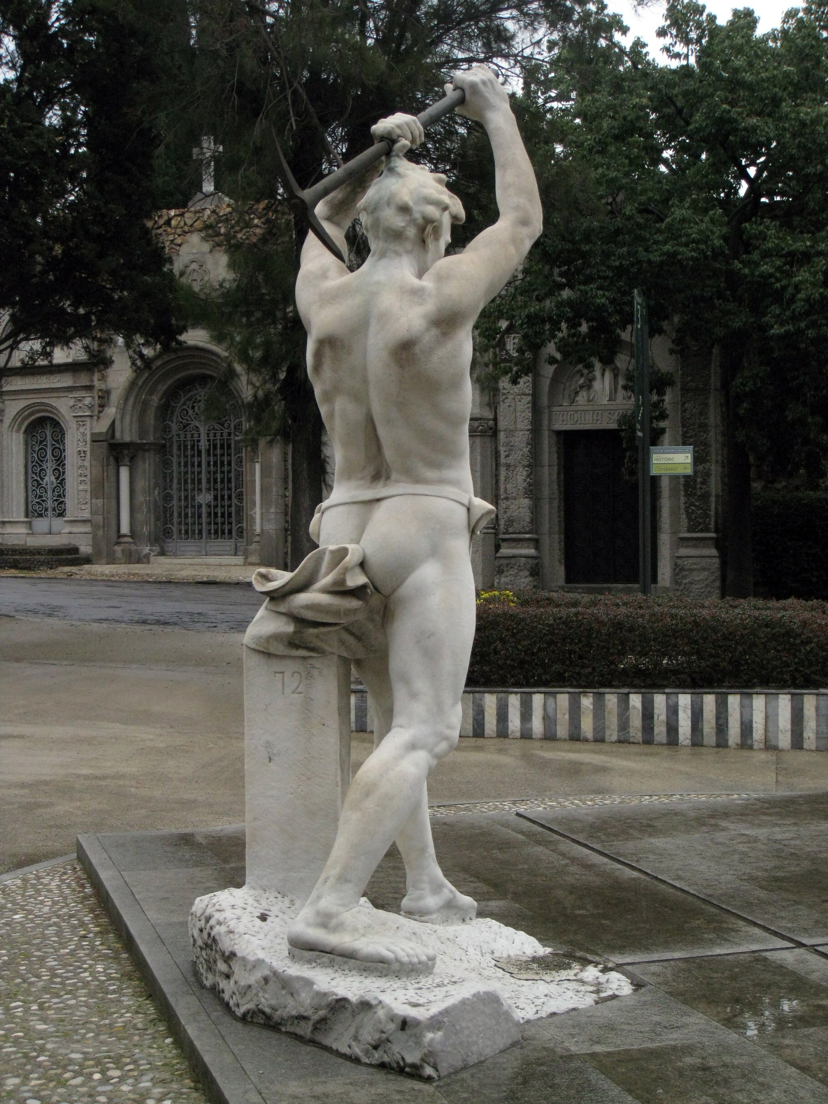 Cementiri de Montjuïc (Barcelona) Object location41° 21′ 12.93″ N, 2° 09′ 17.93″ E